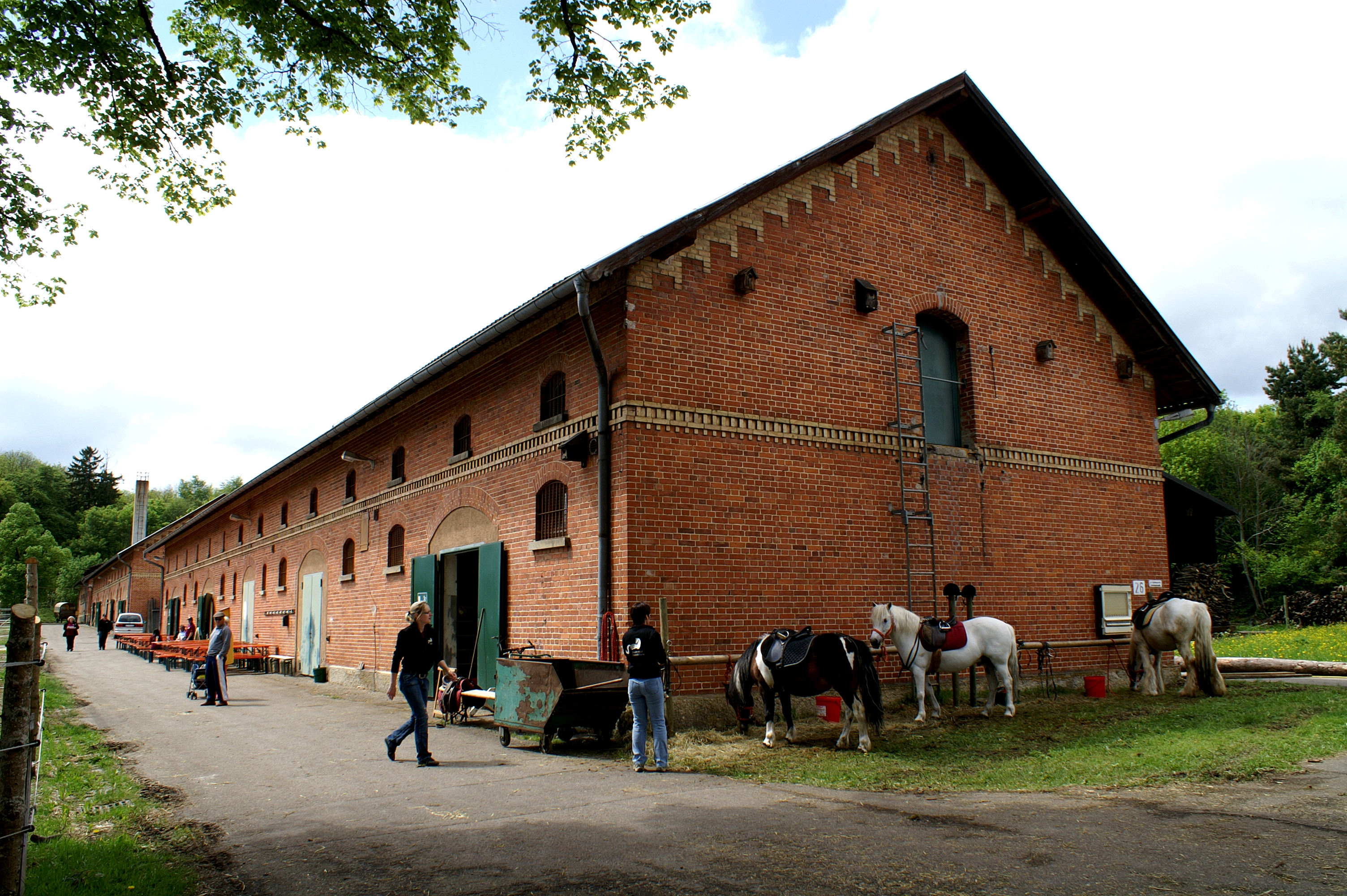 Stallungen im ehemaligen Remonte-Depot in Breithülen auf der Schwäbischen Alb. Heute befindet sich auf dem Areal ein Reiterhof.